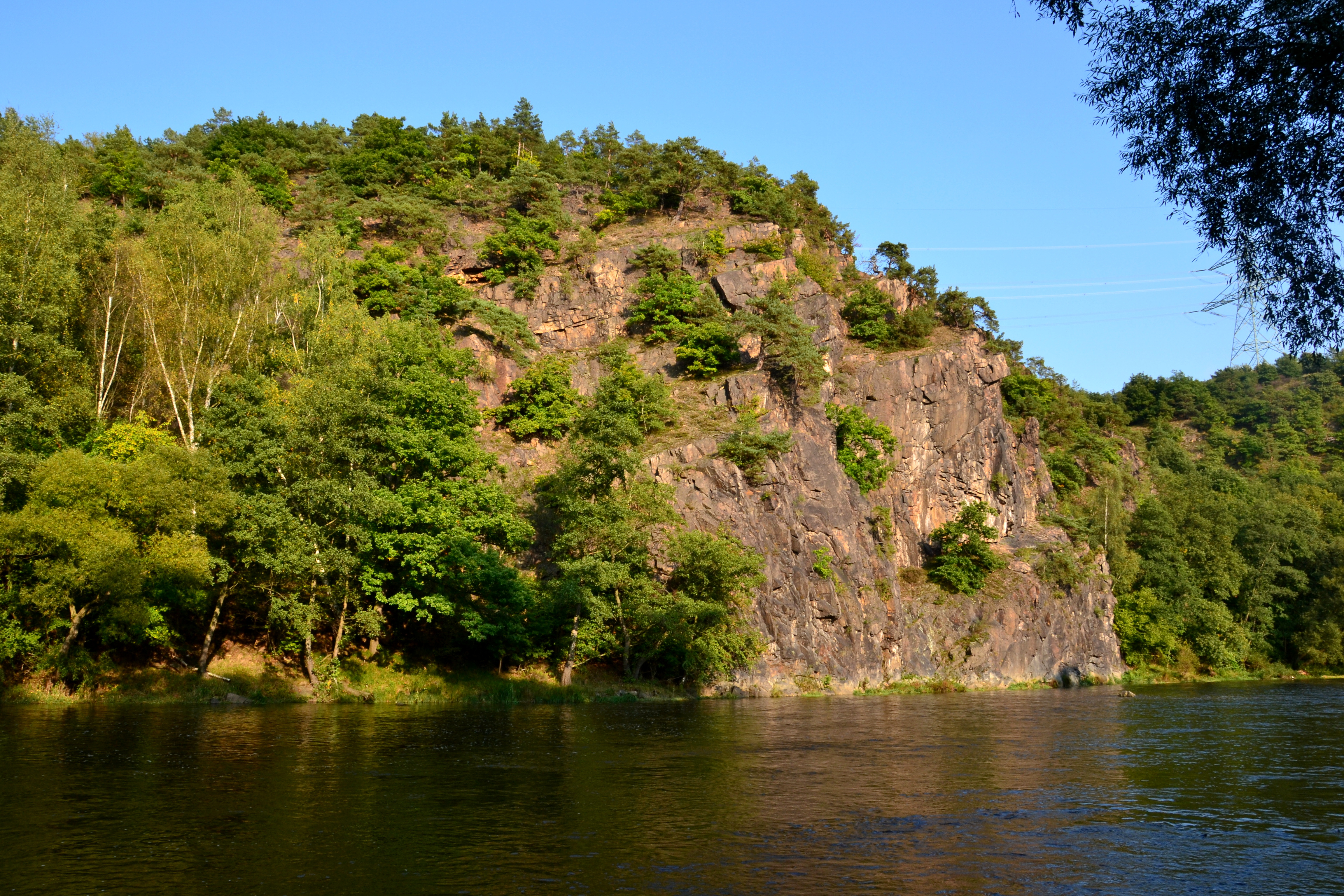 Přírodní památka Želinský meandr - Havraní skála